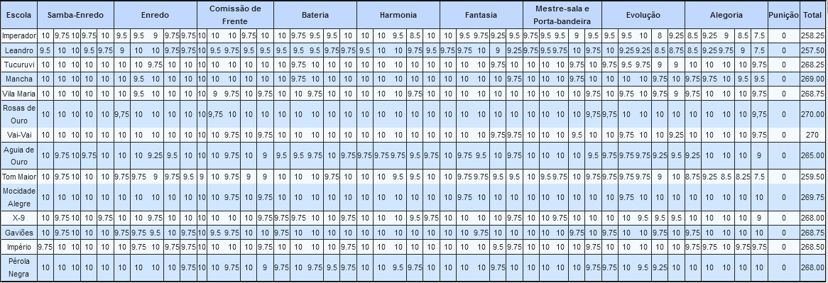 Resultados do Carnaval de São Paulo - 2010